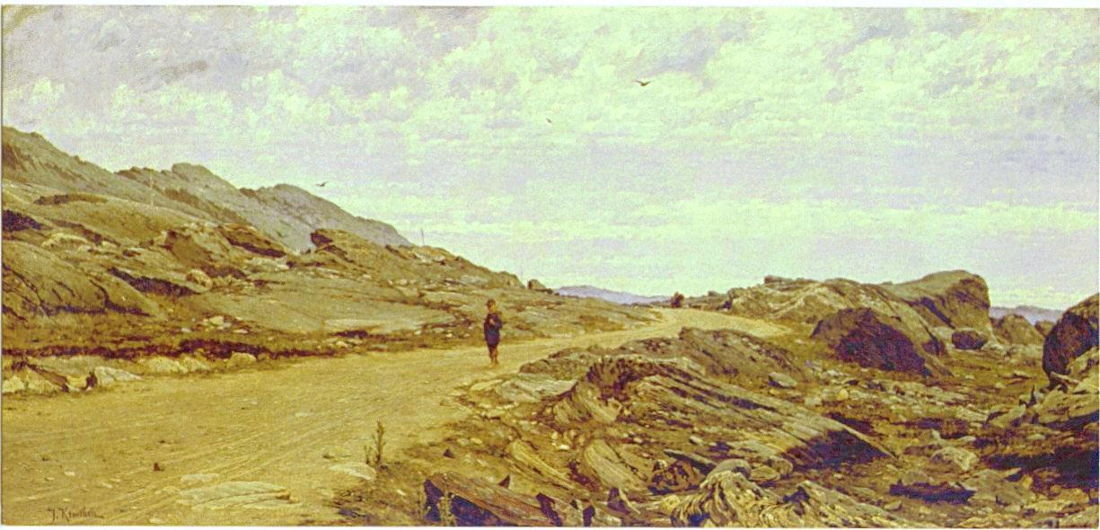 Stenigt landskap i Bohusläntitle QS:P1476,sv:"Stenigt landskap i Bohuslän" label QS:Lsv,"Stenigt landskap i Bohuslän", olja på duk, 75 × 160 cm.